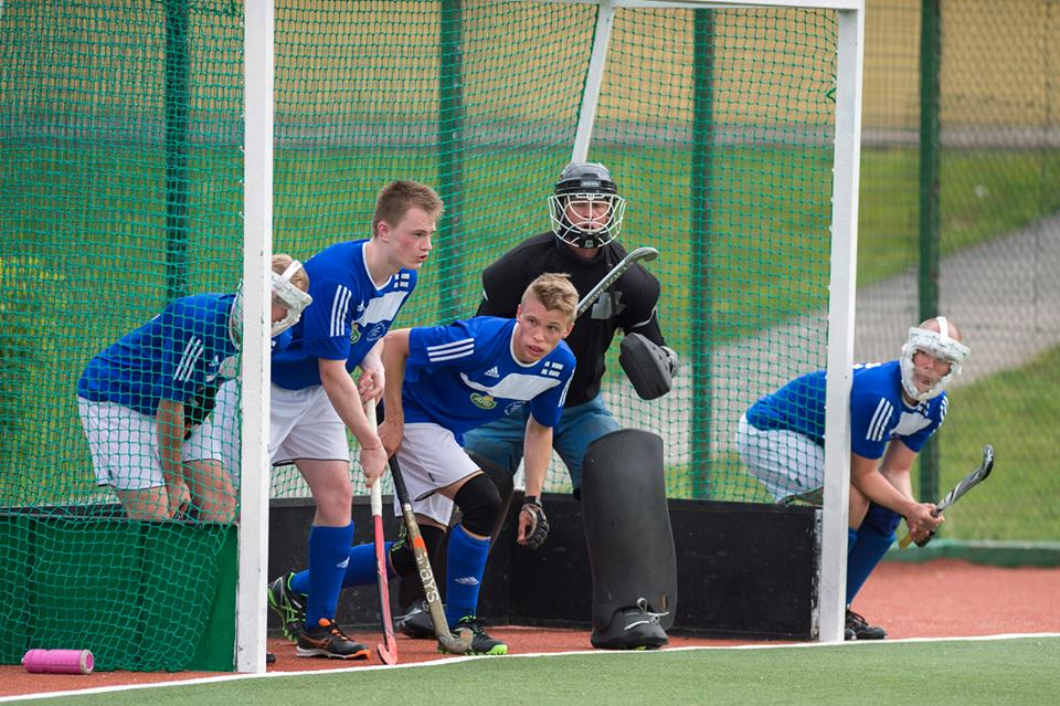 Maahockey: lyhyt kulma